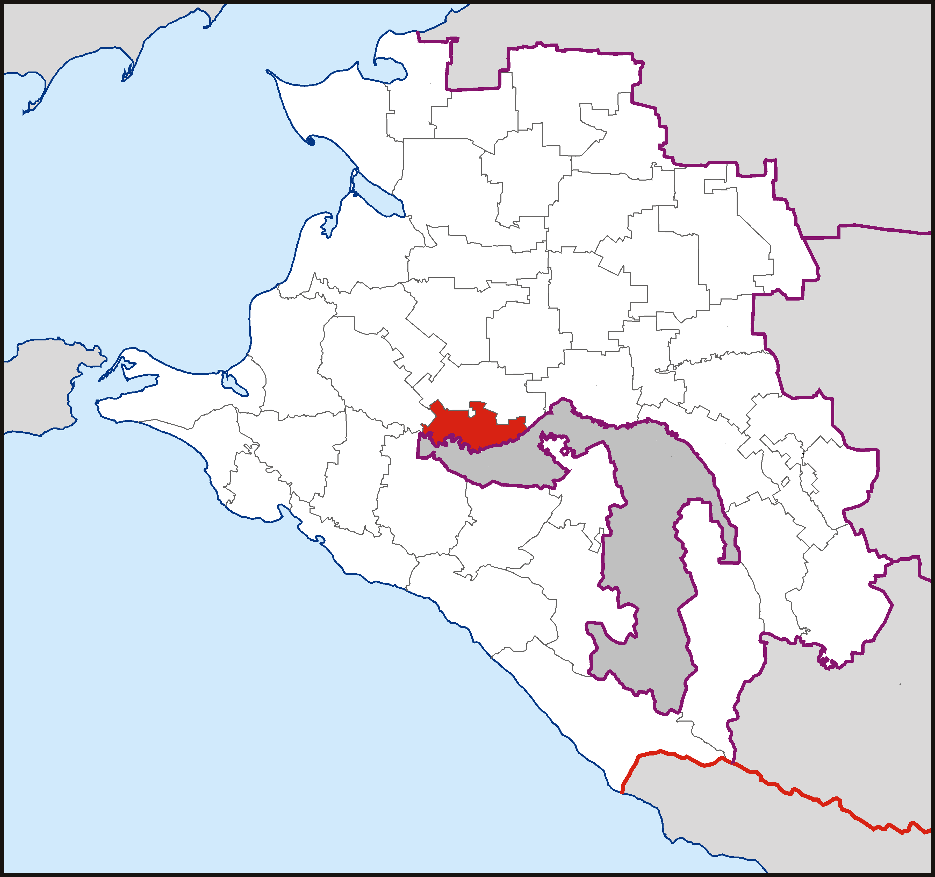 Муниципальное образование "Город Краснодар" на карте Краснодарского края